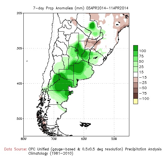 Precipitaciones "anormales" entre el 5 y 11 de abril de 2014 en Argentina. Entre estos días ocurrieron temporales que dejaron como saldo 6 muertos y 3000 evacuados en varias provincias.